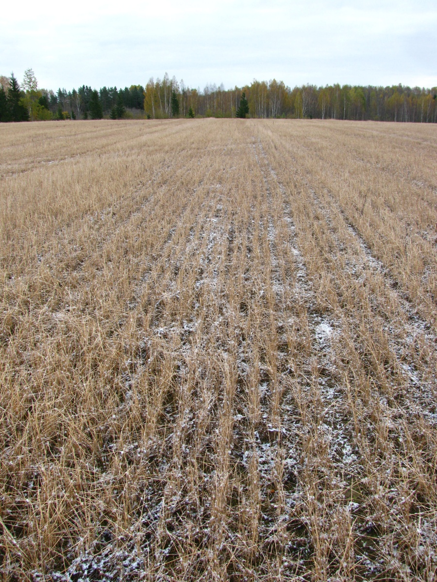 harvested field at Pragi